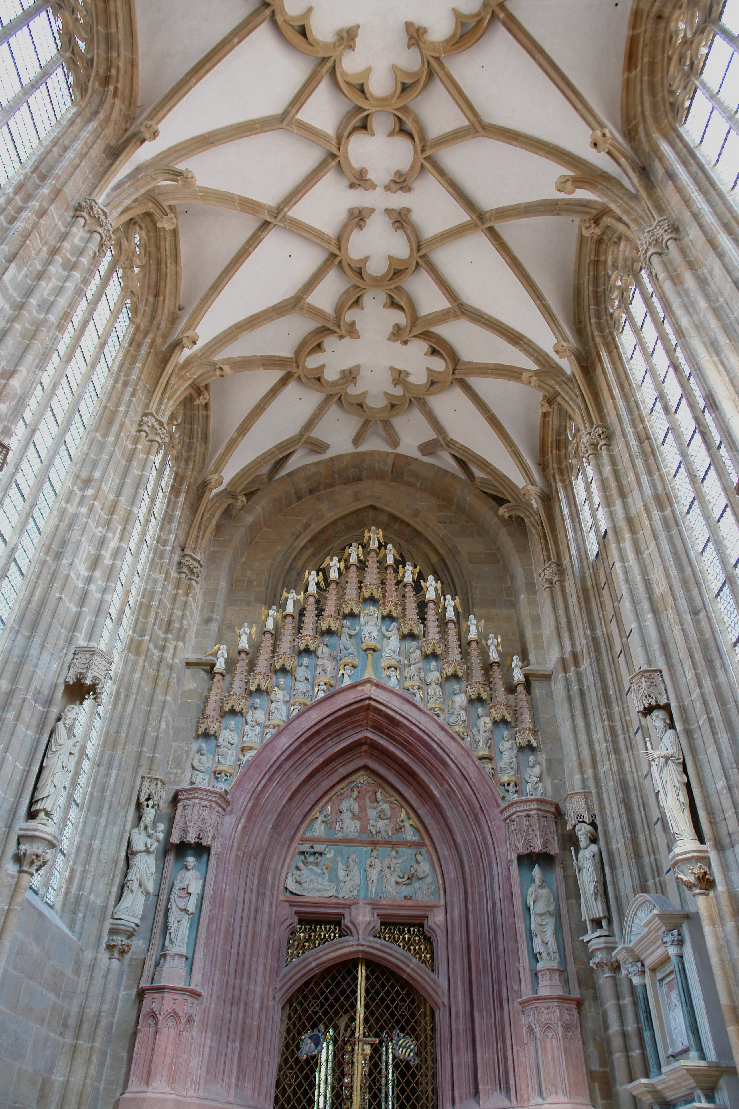 Fürstenkapelle